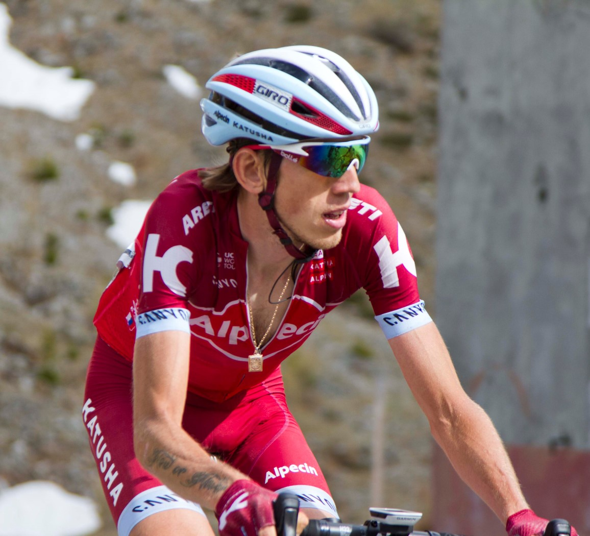 029 zakharin